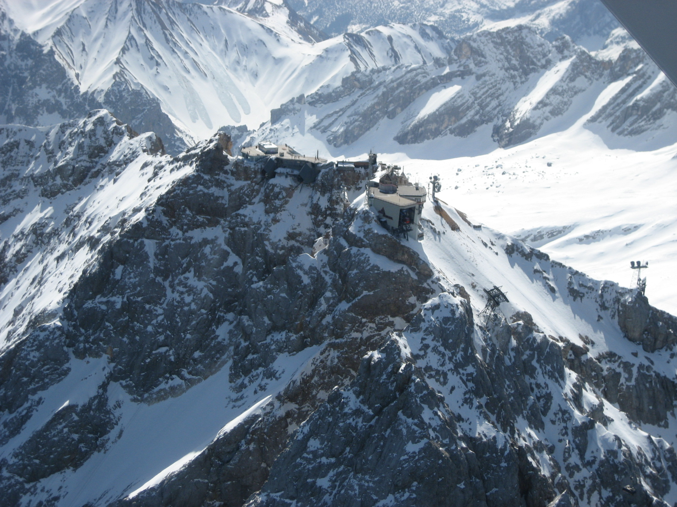 Zugspitze (Luftbild).jpg